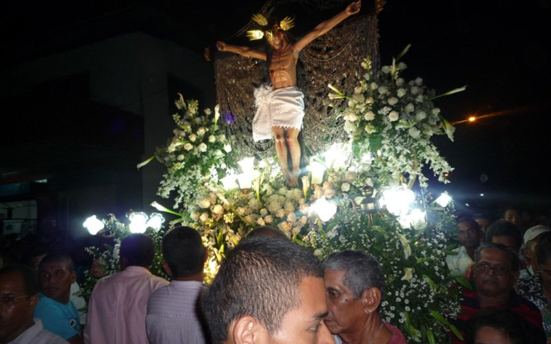 Procesion del Cristo de Esquipulas